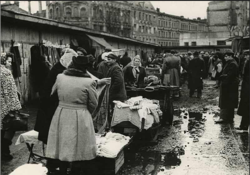 Szaberplac przy pl. Grunwaldzkim we Wrocławiu